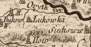 Łukówek na mapie Carte de la Pologne divisée par provinces et palatinats et subdivisée par districts construite par J. A. B. Rizzi Zannoni , Paryż 1772